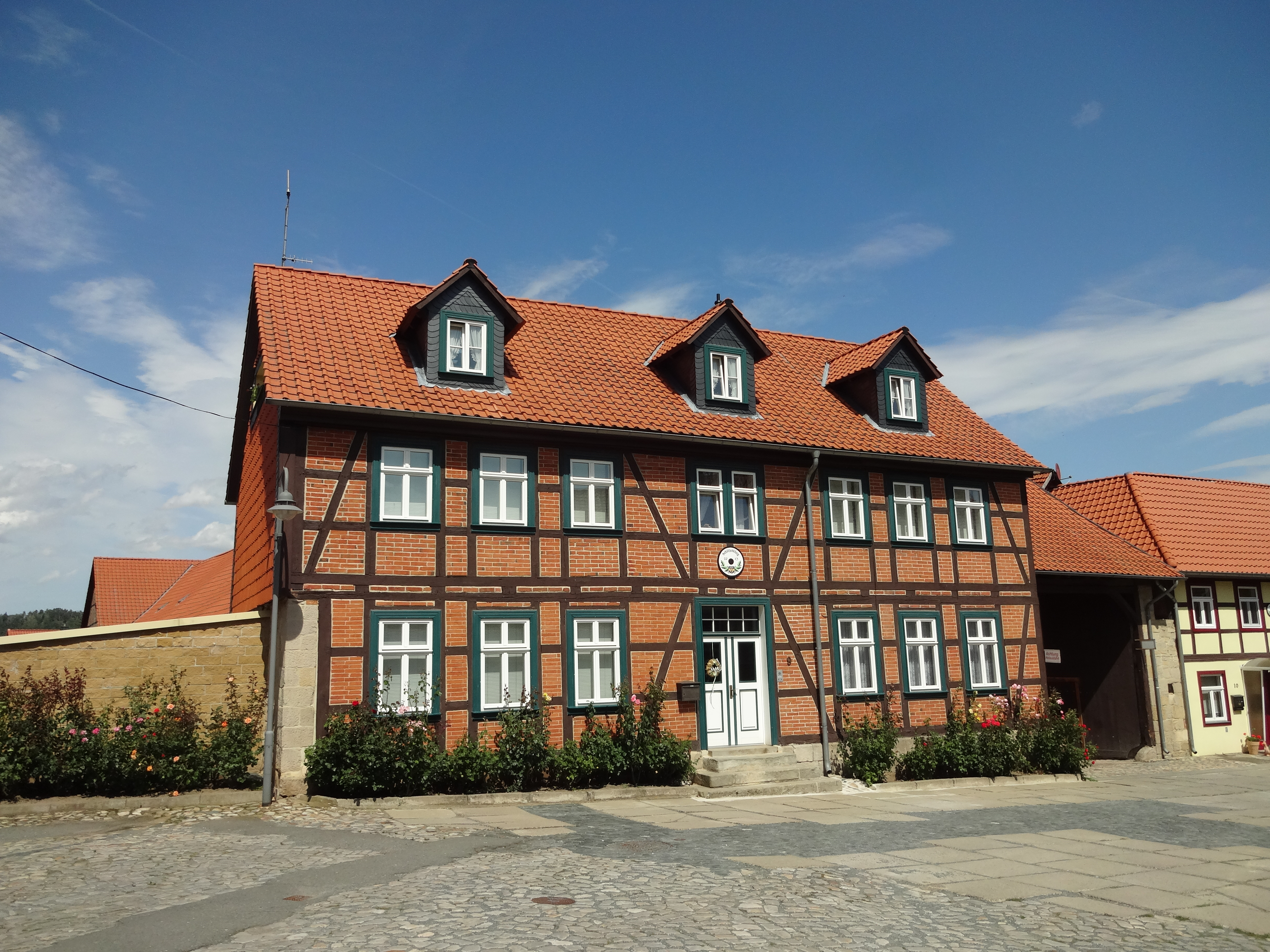 denkmalgeschützter Bauernhof in der Hohen Straße 9 in Börnecke, Ortsteil von Blankenburg/Harz